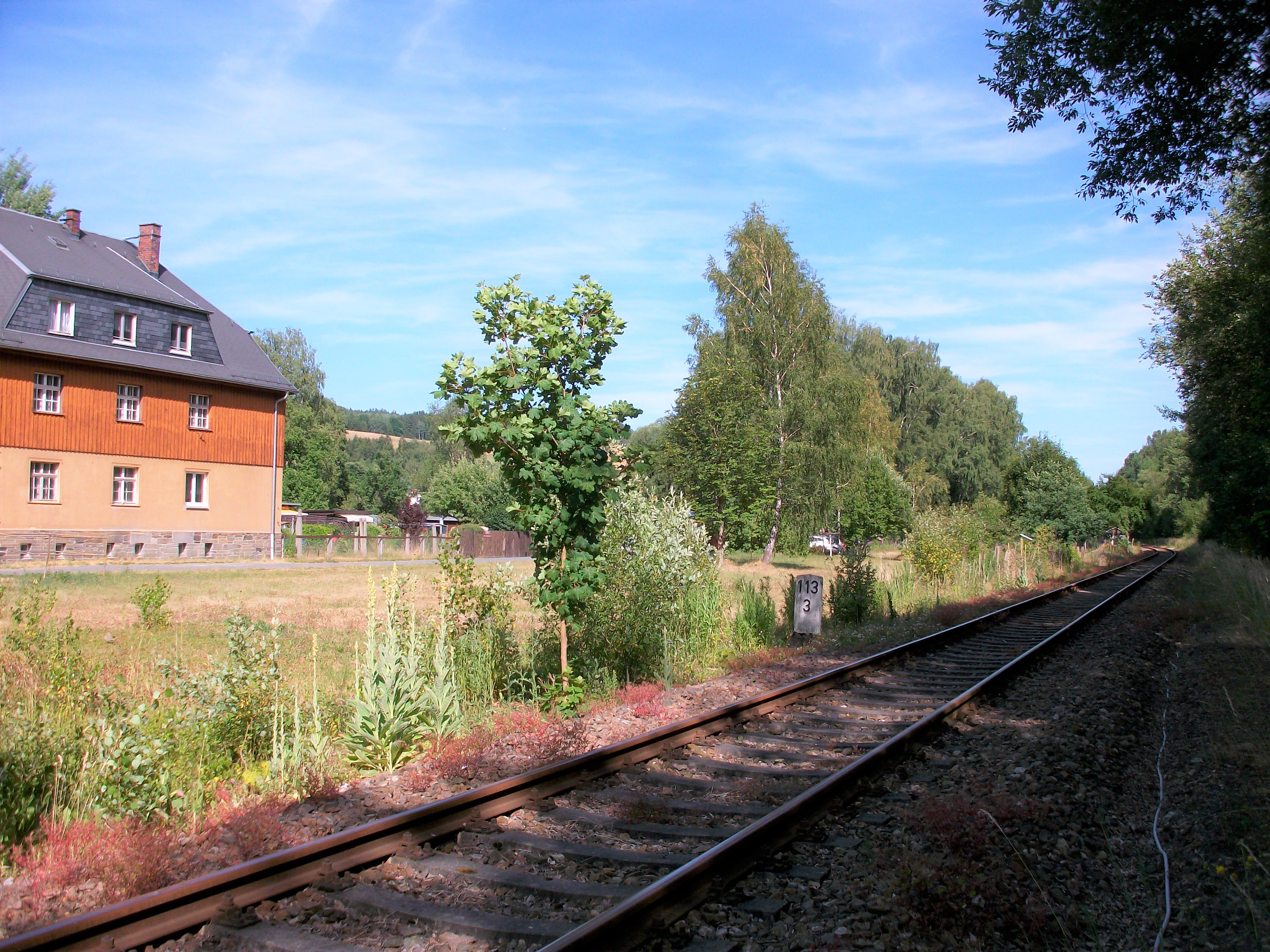 Ehemalige Haltestelle Adorf (Vogtl), Standort des abgerissenen Empfangsgebäudes (1)